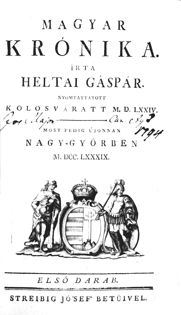 Chronica az Magyaroknac dolgairúl